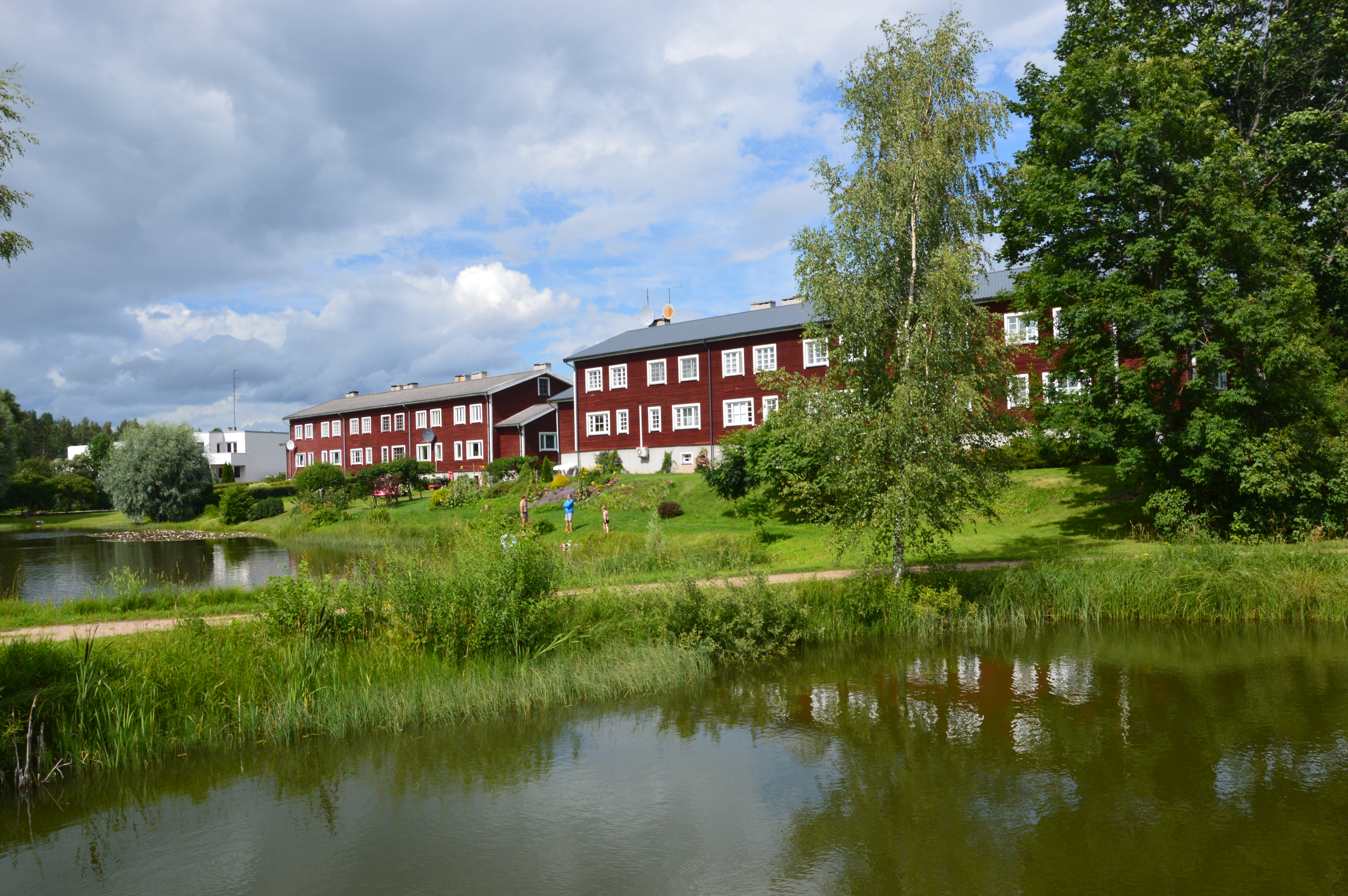 Tõravere alevik.